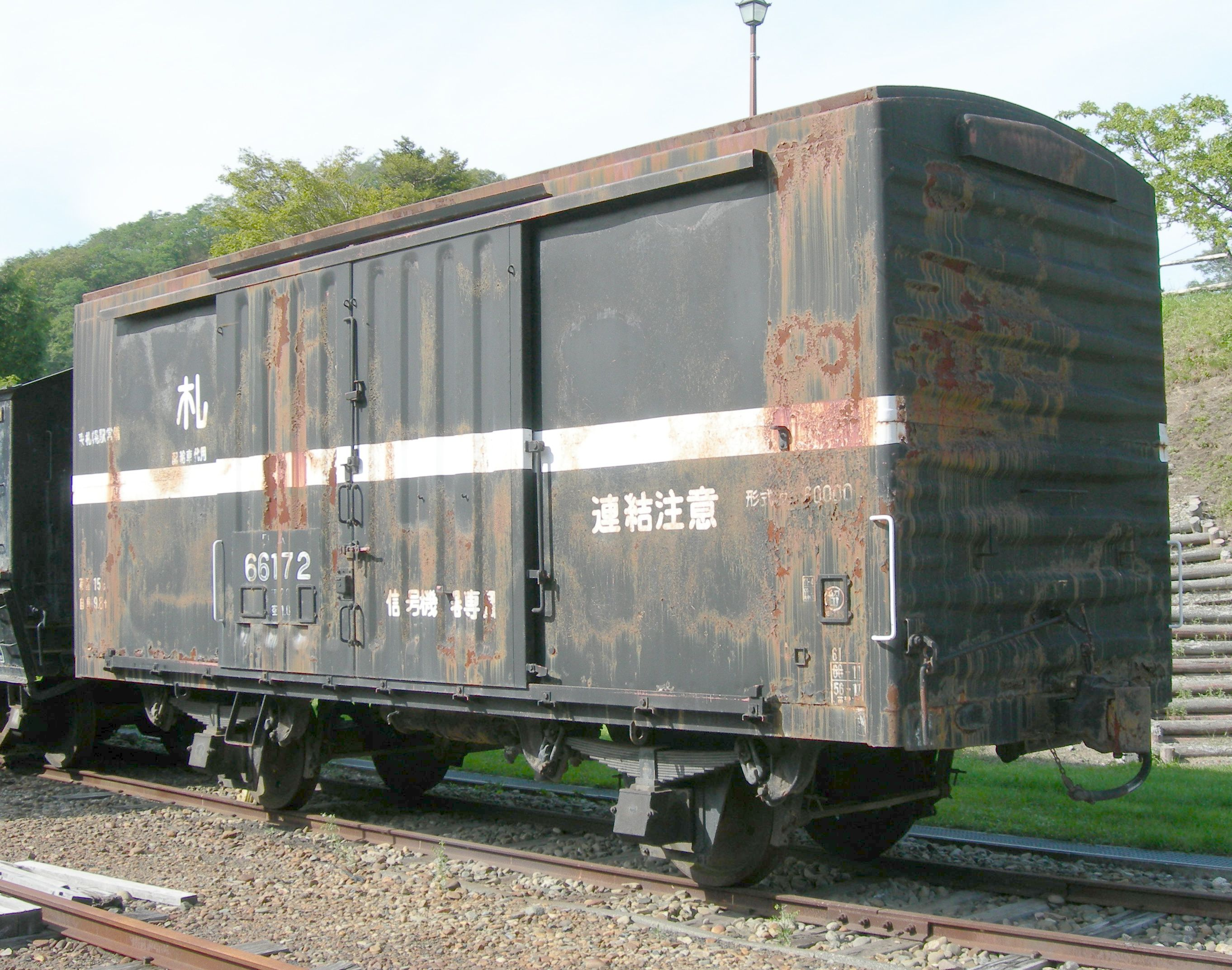 国鉄ワム60000形66172。三笠鉄道記念館にて。 Nikon Coolpix 7600